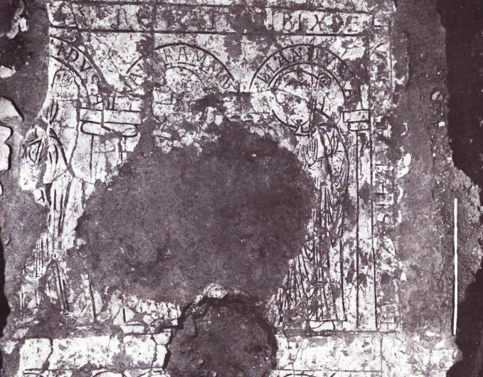 Ausschnitt aus der Archäologischen Grabung in der Kirche von Kloster Benediktbeuern